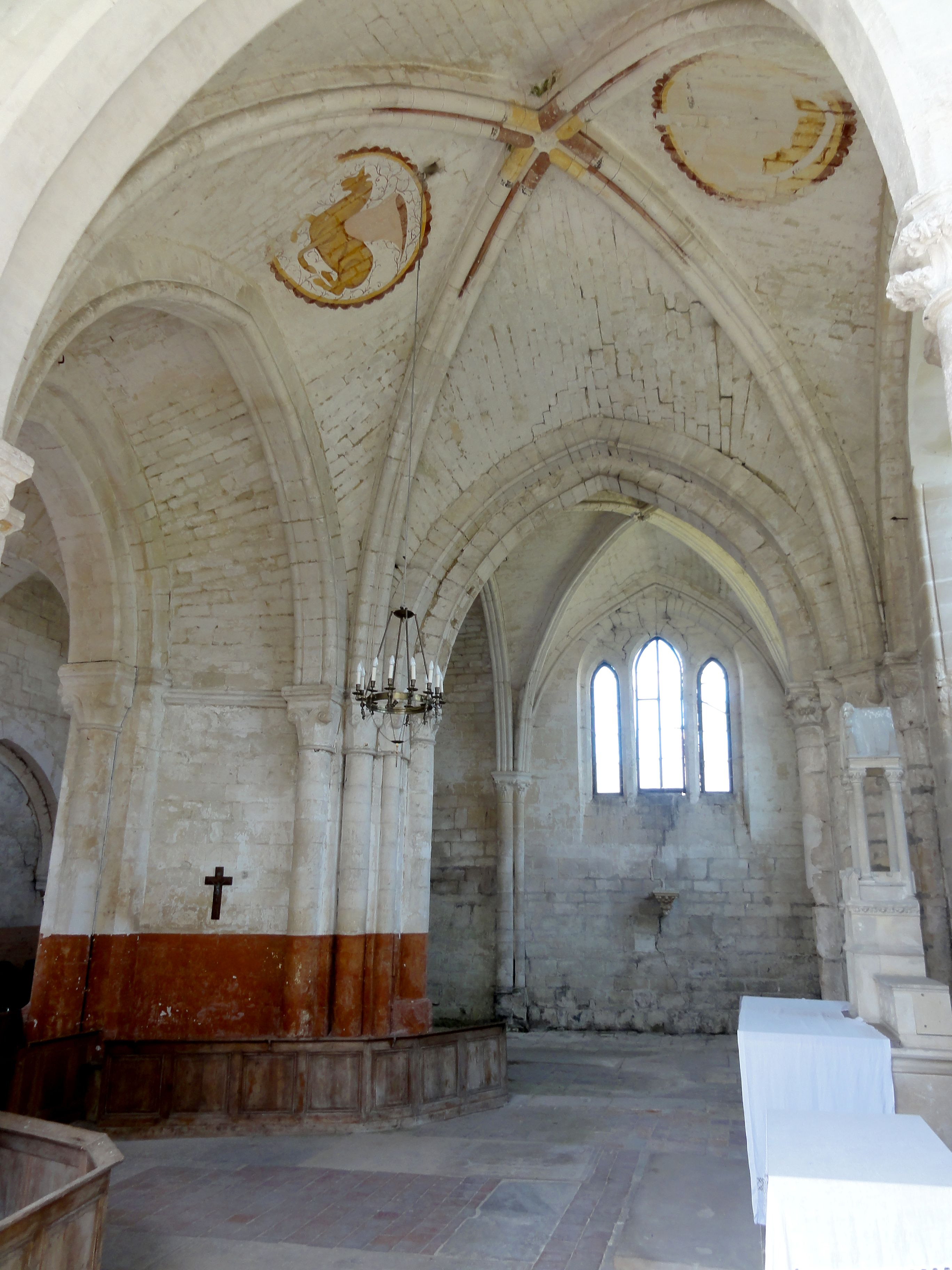 Chœur, vue vers le nord.